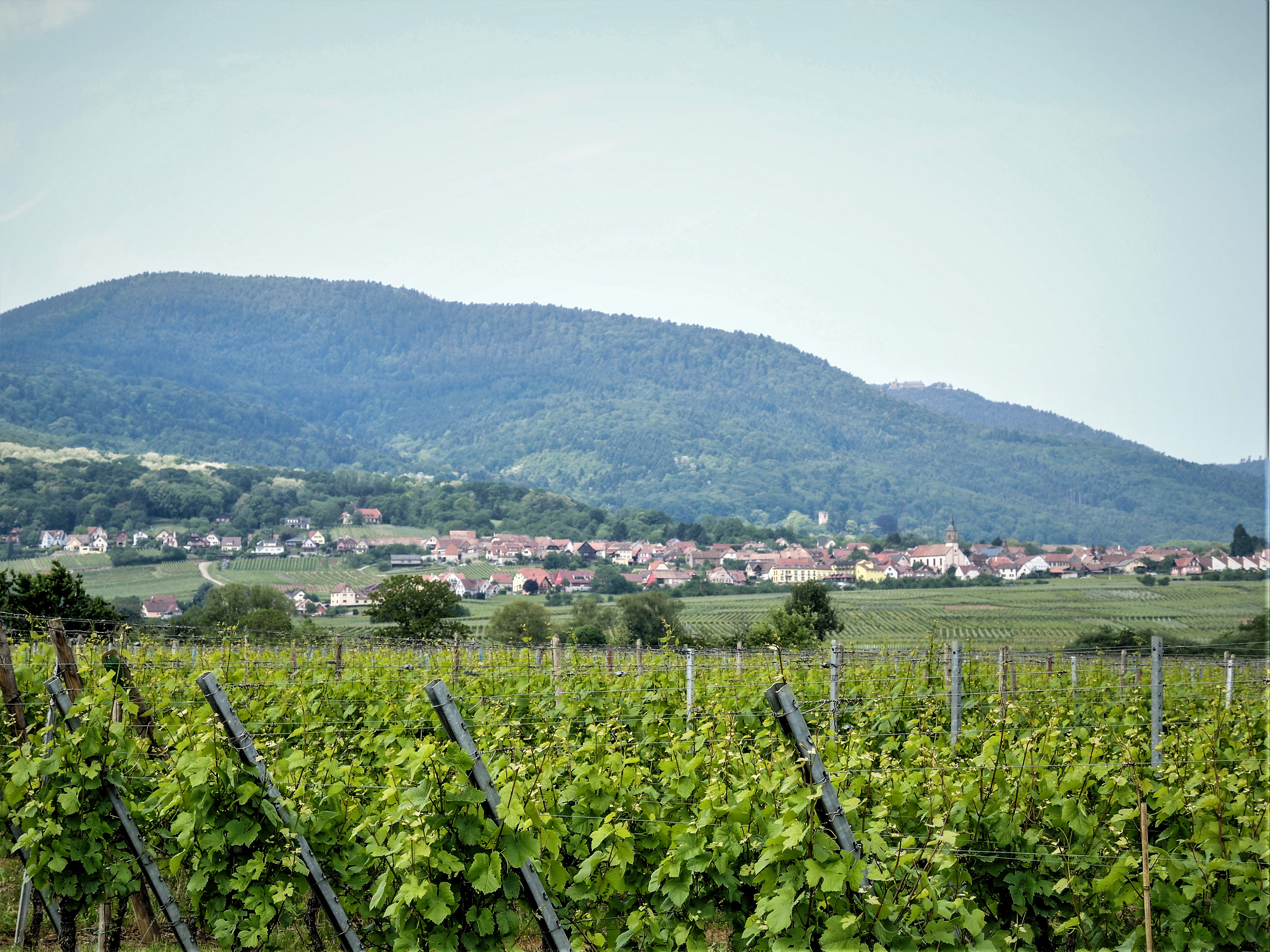 Village d'Heiligenstein et mont sainte-Odile, vus de la route de Sand. Bas-Rhin